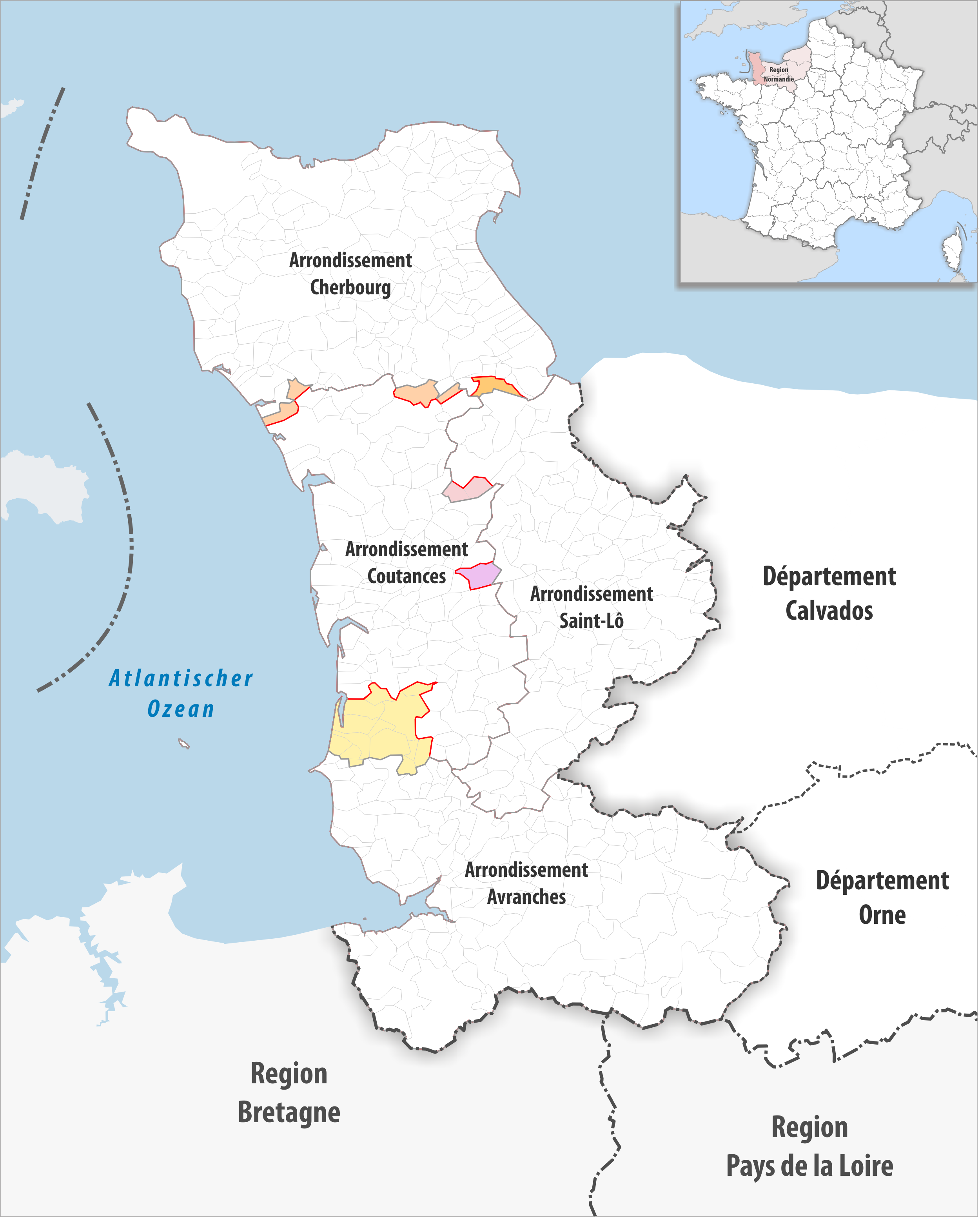 Arrondissements Anpassungen auf 2017 im Departement Manche